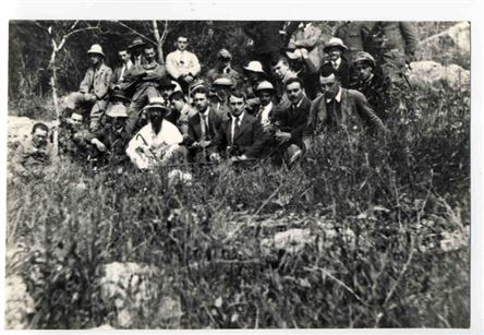 טיול ראשון בארץ ישראל של סטודנטים יהודים ציונים מגרמניה, בראשות אליהו אורבך (במרכז מקדימה)